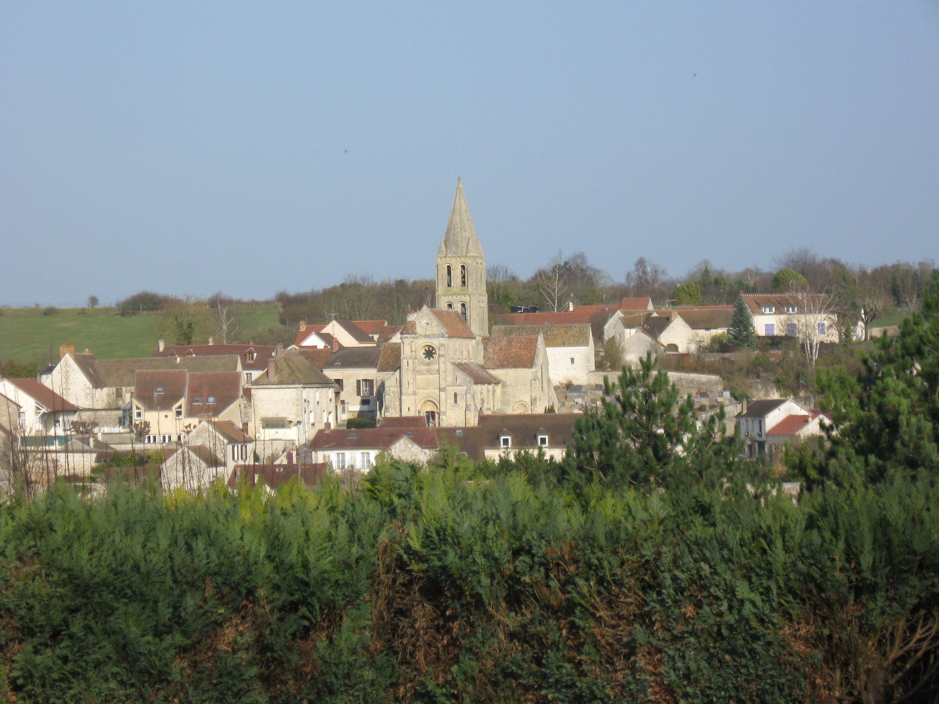 Santeuil (Val-d'Oise, région Île-de-France)